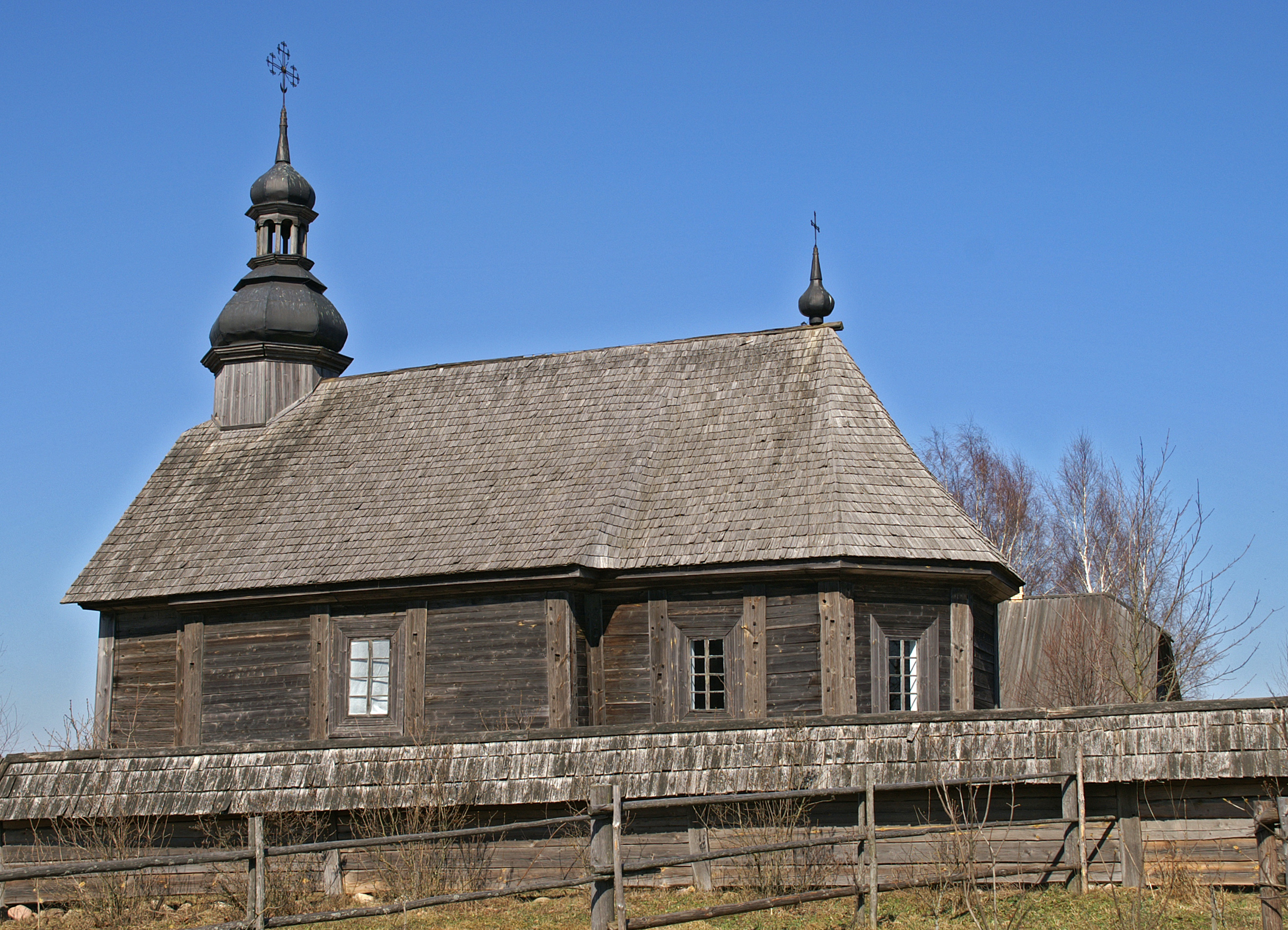 Беларуская (тарашкевіца): Пакроўская царква зь в. Логнавічы Клецкага раёну Менскай вобласьці. в. Азярцо This is a photo of Belarusian heritage monument. Reference number: 612Г000380 ( WLM)